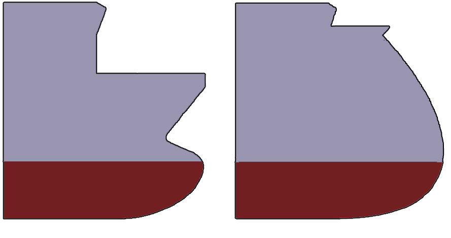 Vergleich Wulstbug - X-Bow